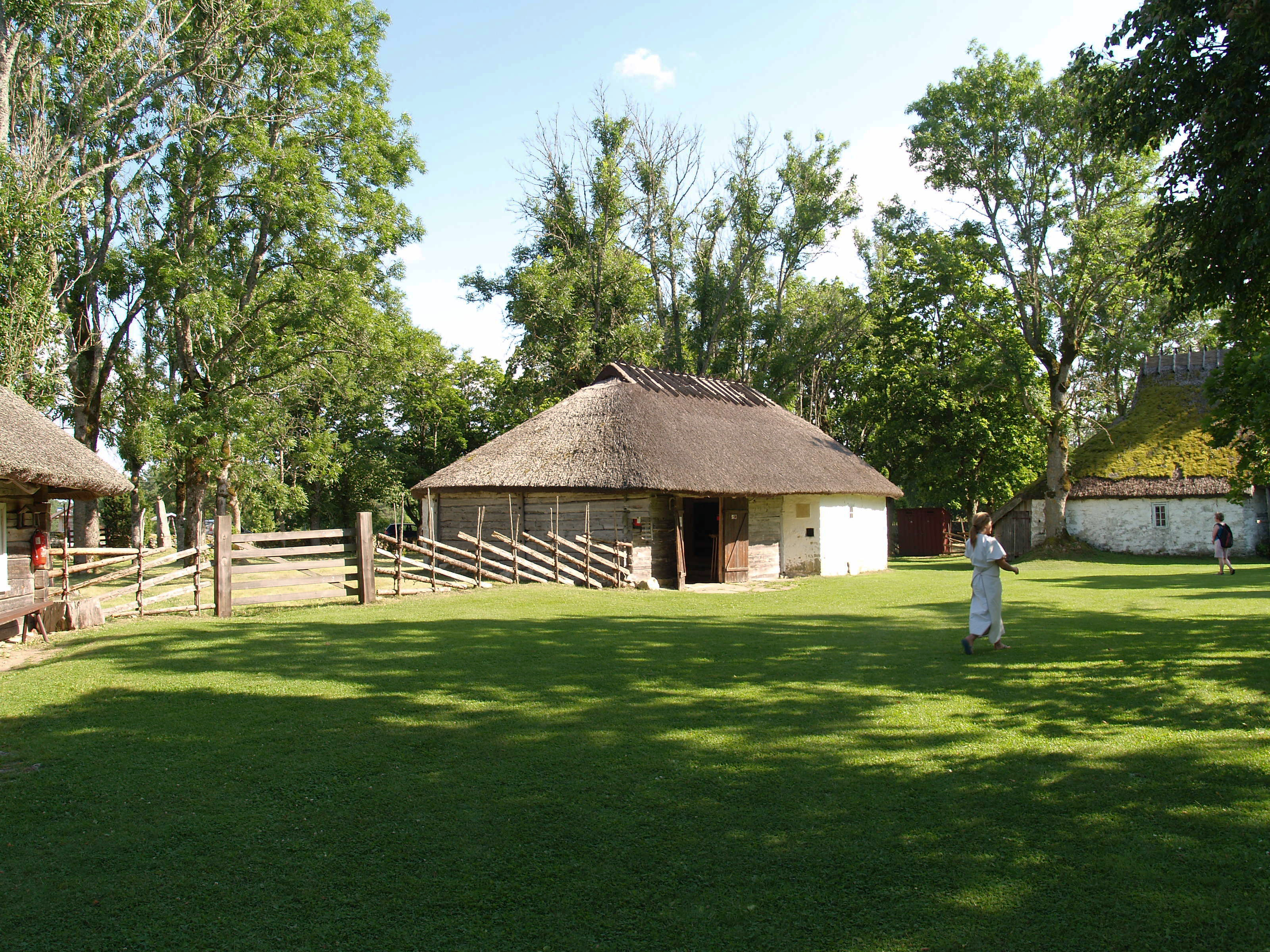 Mihkli talu vankrikuur. Otsapidi jäävad pildile ka elumaja ja rehi.